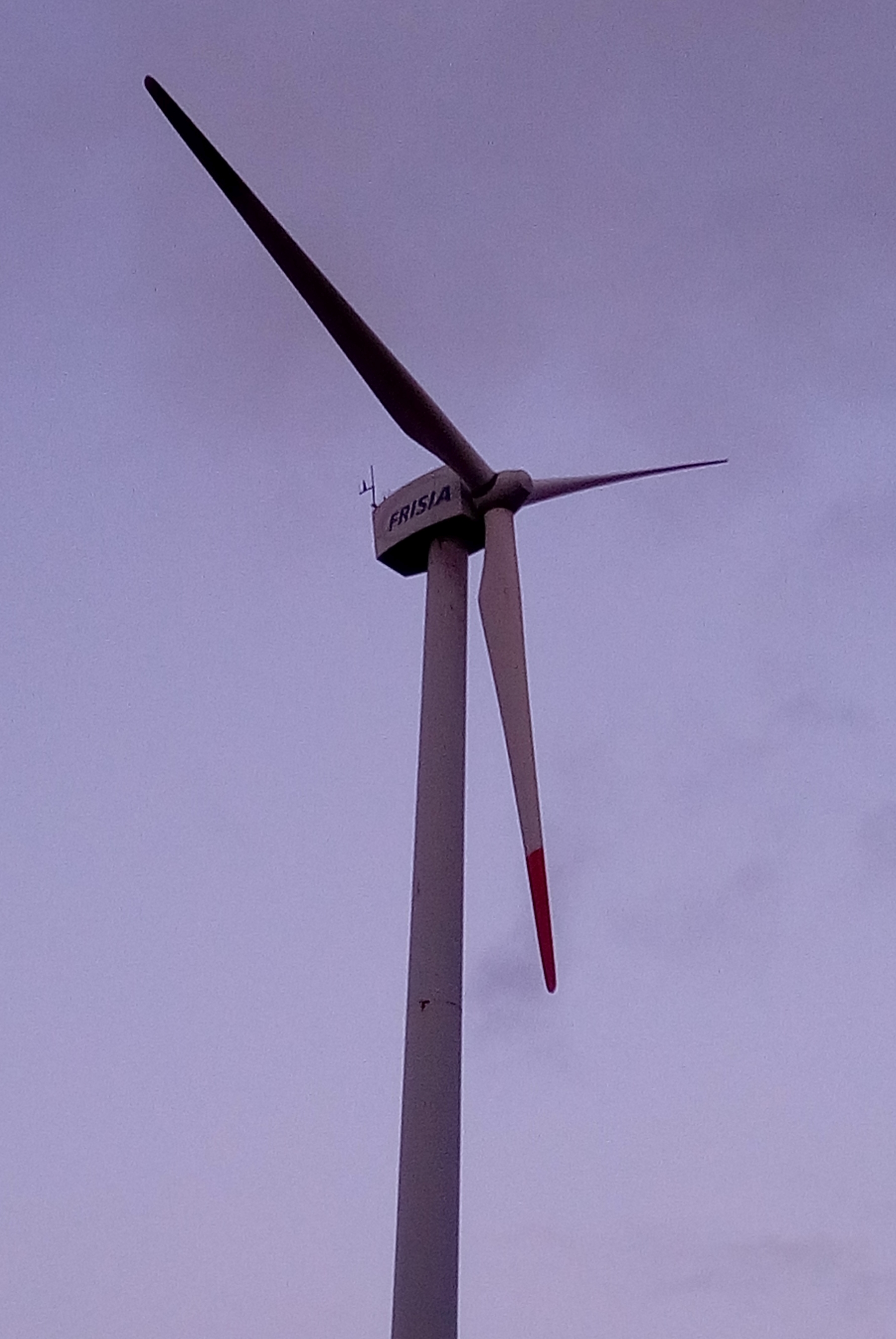 Frisa Rotor in Minden Päpinghausen